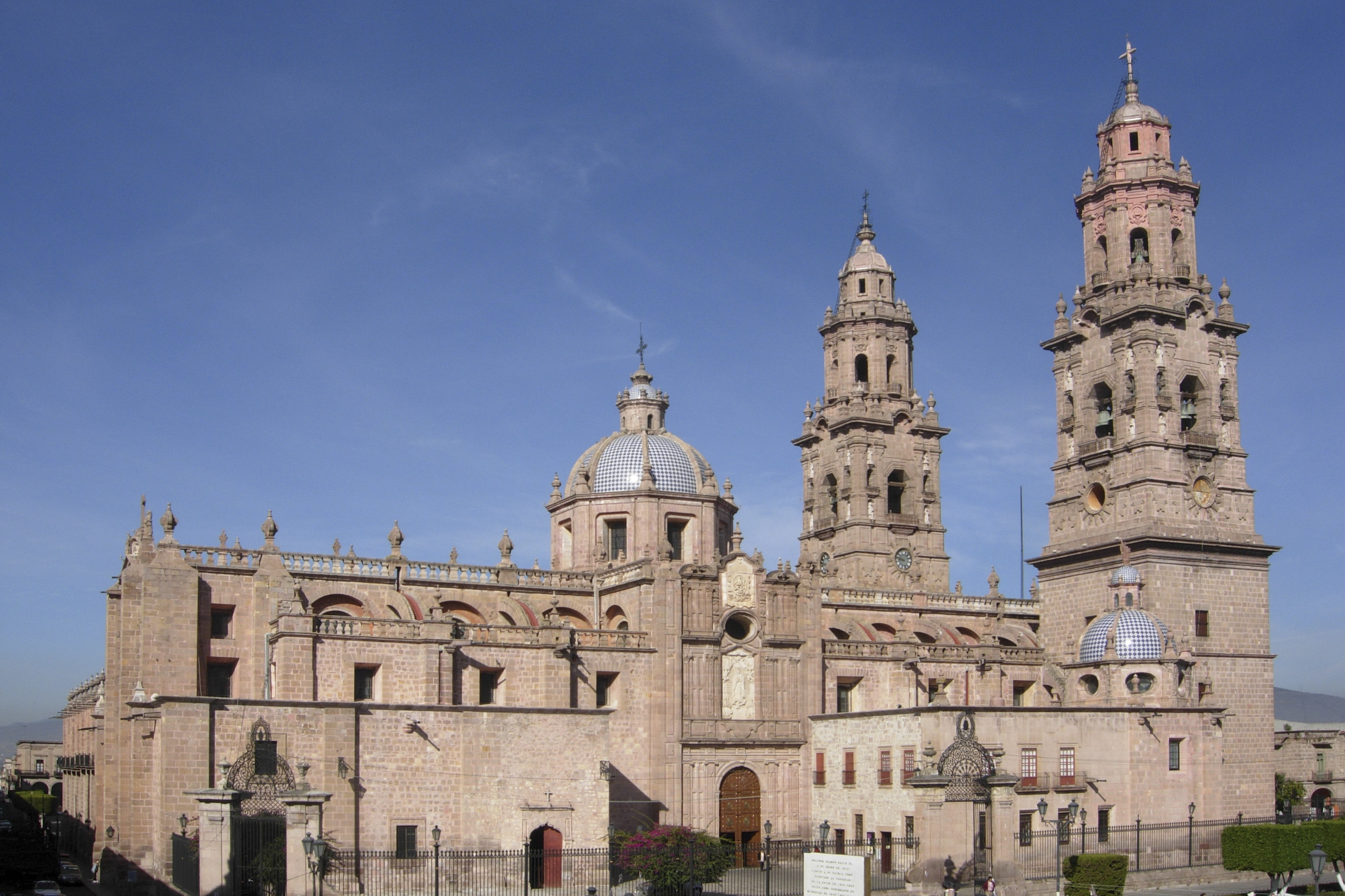 Catedral Metropolitana de Morelia